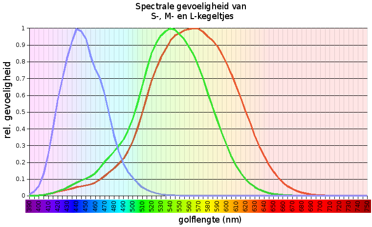 Spectrale gevoeligheid van de drie verschillende soorten kegeltjes in het netvlies. Cijfers ontleend aan "the Stockman & Sharpe (2000) 10° quantal cone fundamentals"; grafiek eigen werk koenB ( Calc).